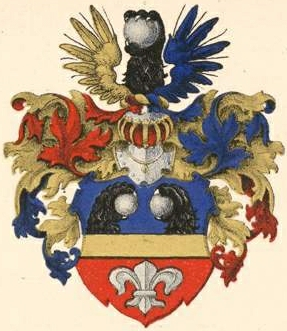 Radinghi suguvõsa aadlivapp